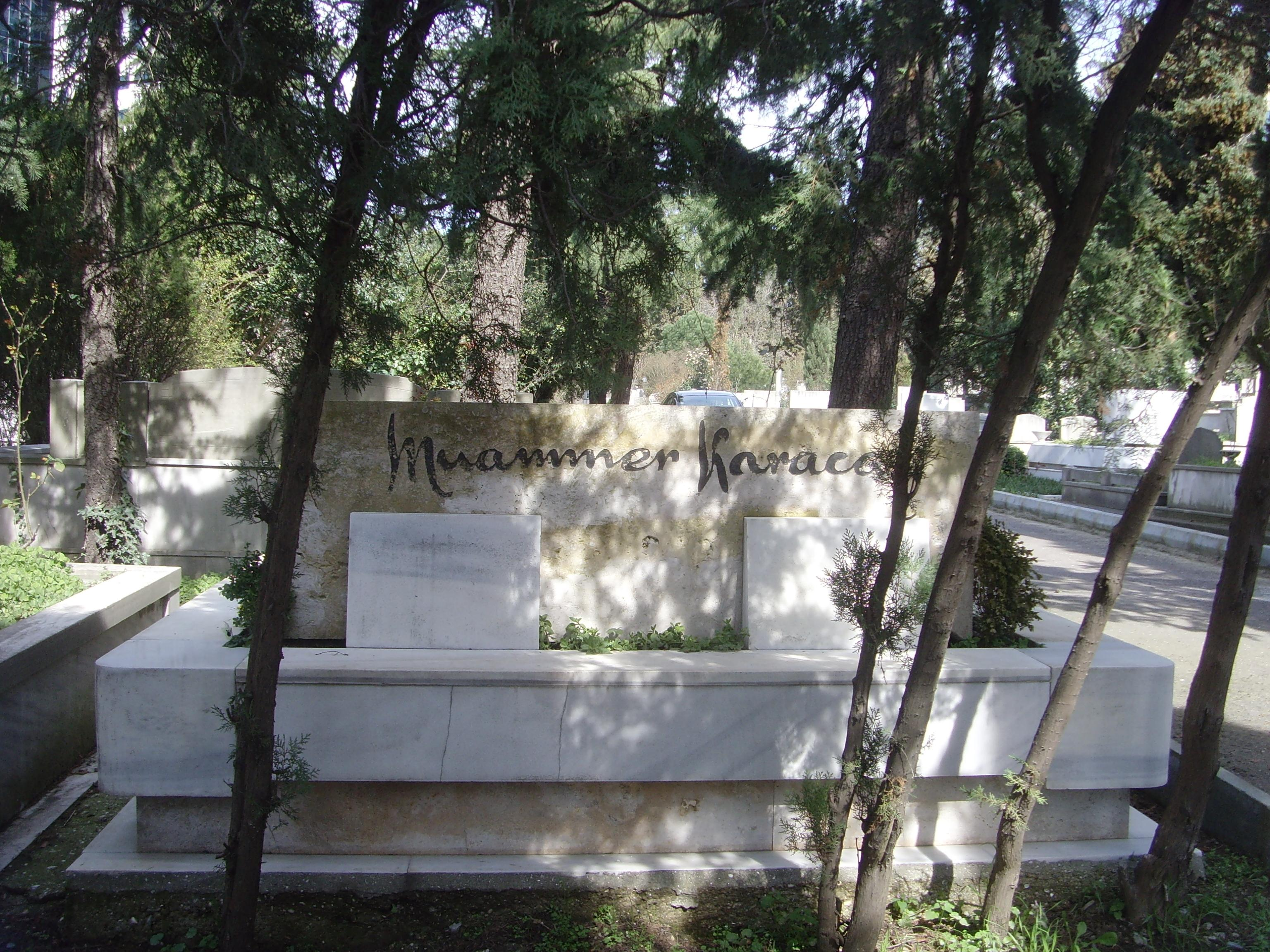 Muammer Karaca'nın Zincirlikuyu Mezarlığı'ndaki mezarı